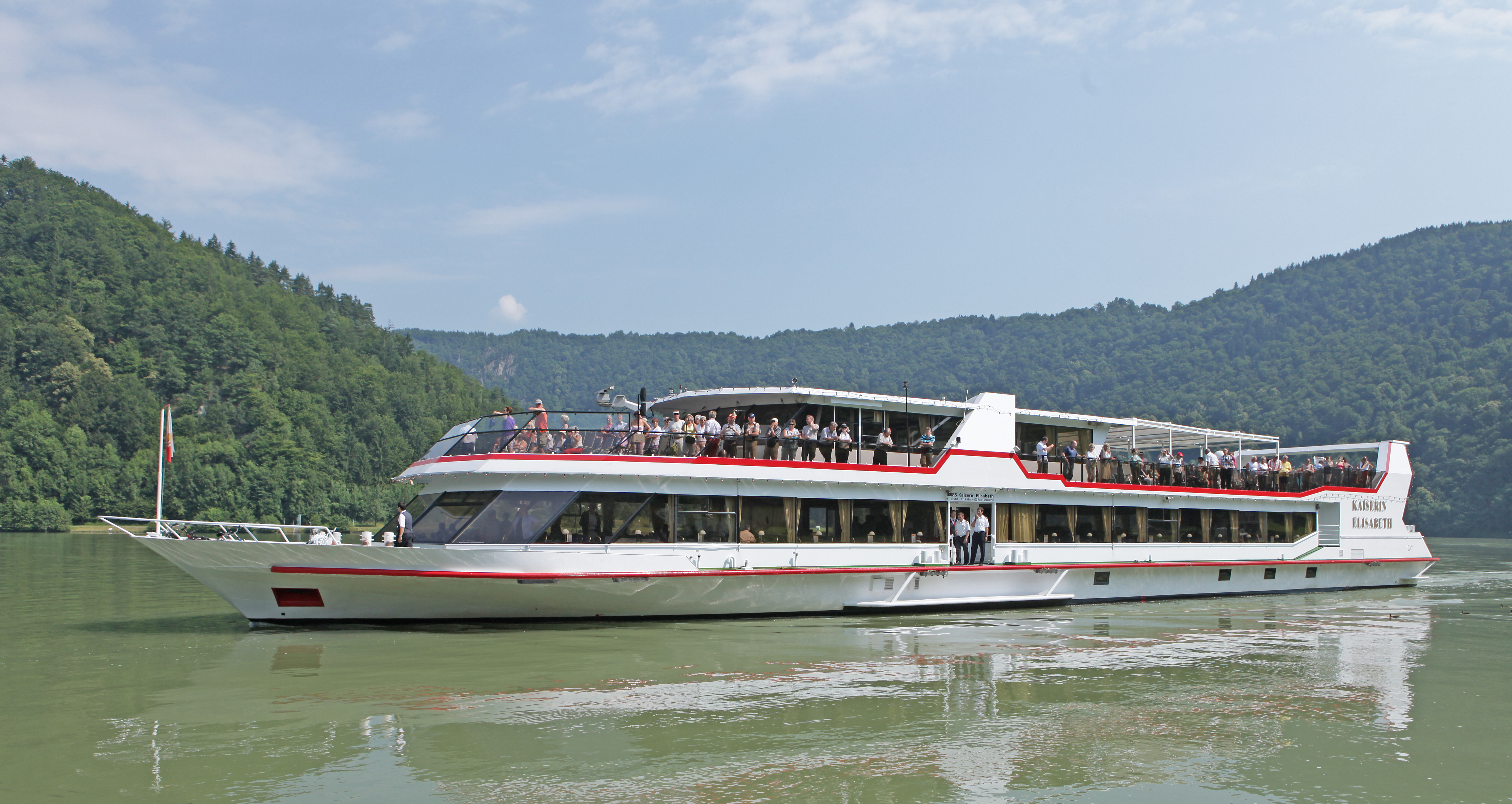 Unsere MS Kaiserin Elisabeth, fotografiert in Schlögen.